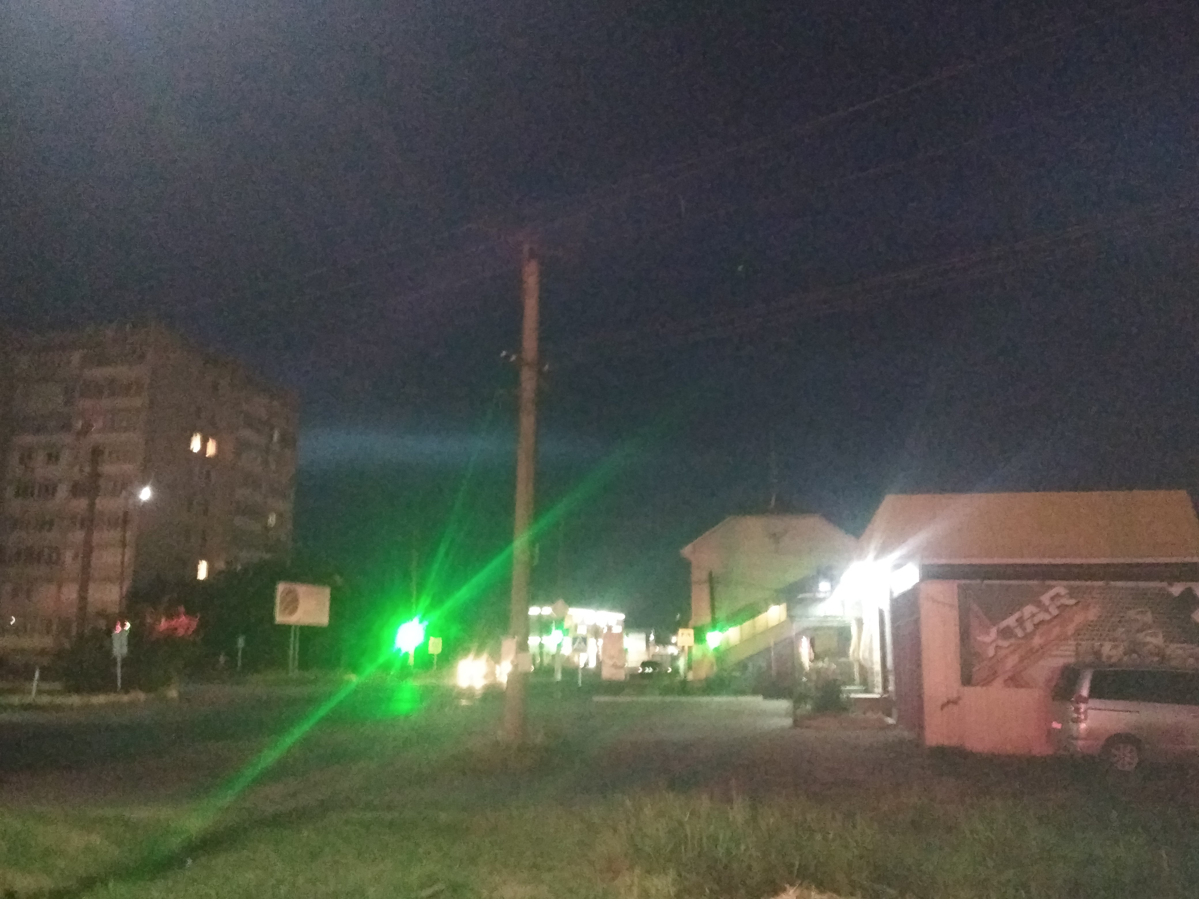 Нохчийн: Мазалк